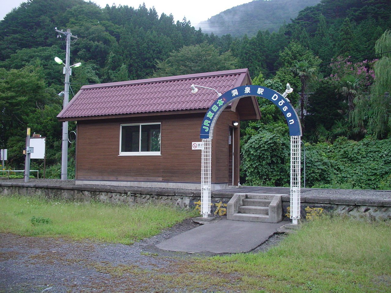 （洞泉駅）